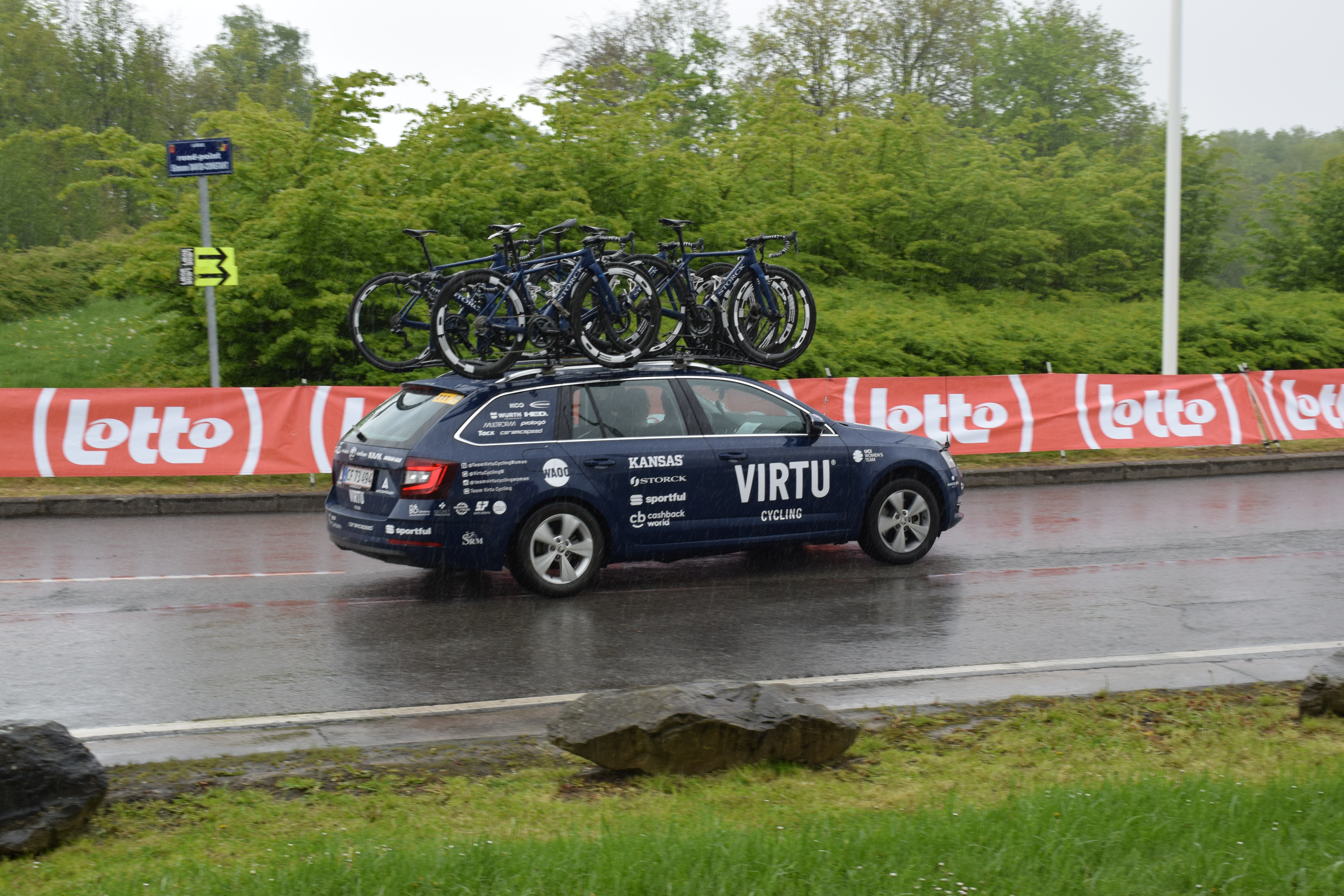 Vue du passage de la course cycliste Liège-Bastogne-Liège 2019, au rond-point Simone David-Constant, sur le campus du Sart Tilman de l'Université de Liège.